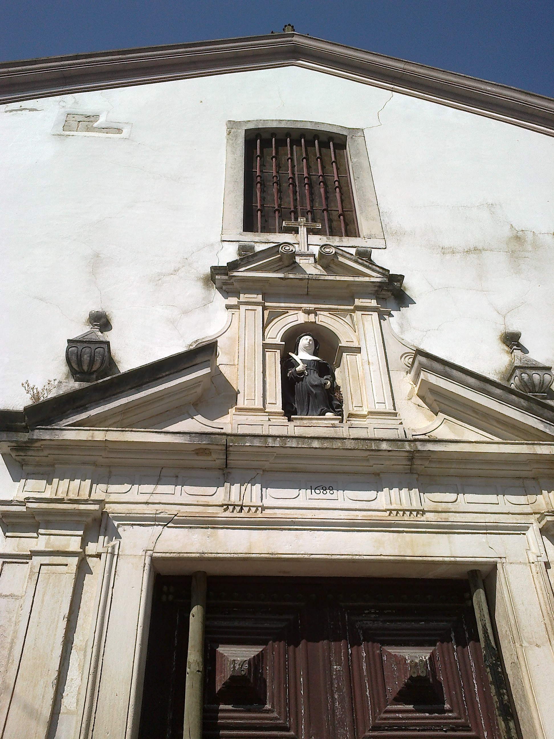 Parroquia de Santa Iria en la freguesia de Ribeira de Santarém